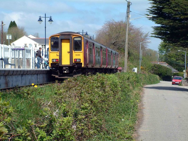 Gunnislake Station